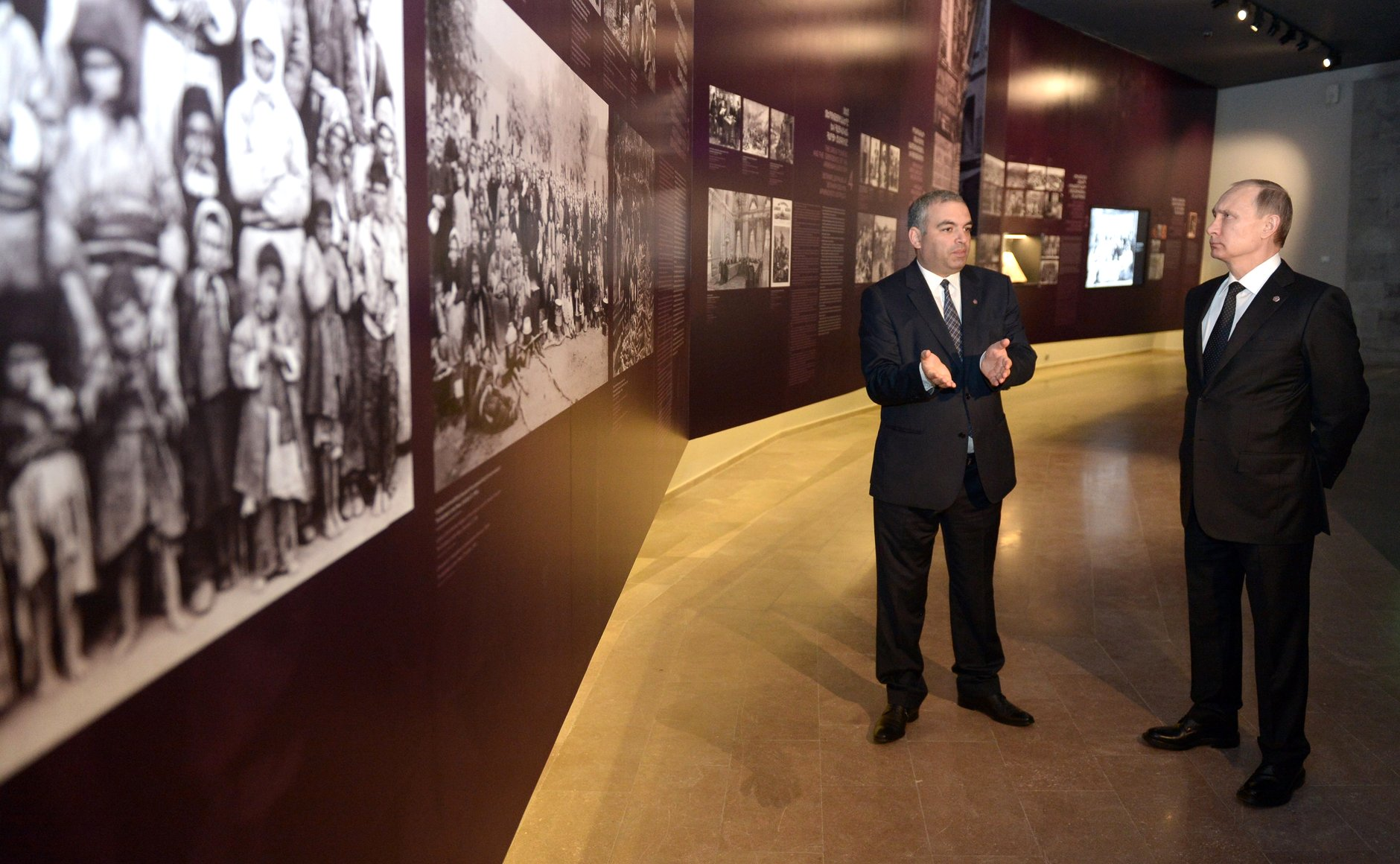 Президент России Владимир Путин на церемонии поминовения жертв геноцида армян в мемориальном комплексе «Цицернакаберд»